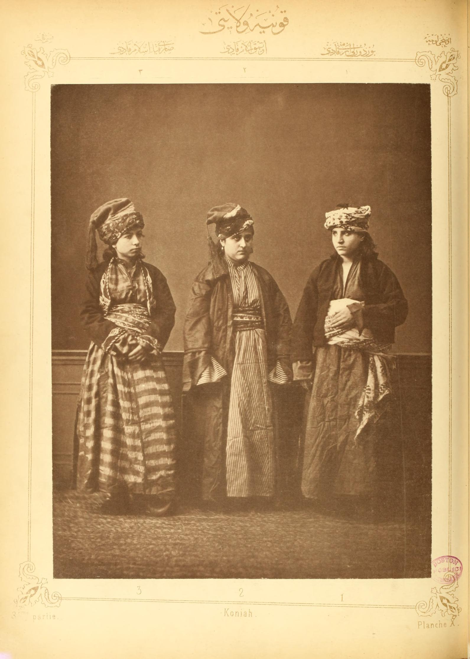 PLANCHE X: Arménienne de Bourdour Femme turcomane du Karı̈è de Outmouk Femme kurde de Sari Kaya